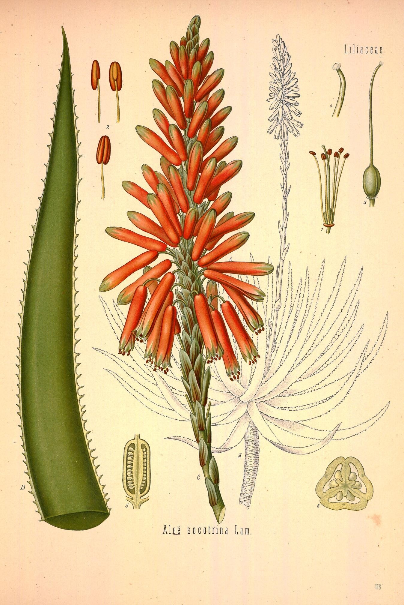 Aloë succotrina. A Pflanze, sehr verkleinert. B Blattspitze, nat. Grösse. C oberer Theil des Blüthenschaftes, nat. Grösse, 1 Blüthe ohne Perigon desgl.; 2 Staubgefässe, vergrössert; 3 Stempel vergrössert; 4 Griffelende desgl.; 5 u. 6 Fruchtknoten im Längs- und Querschnitt, desgl.